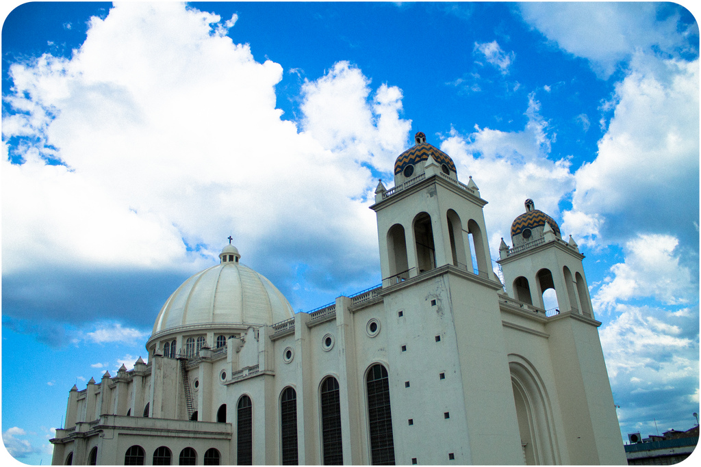 La Catedral metropolitana de San Salvador, es la iglesia más Importante de San Salvador, en ella se encuentra la imagen del Salvador del Mundo el patrono de El Salvador.